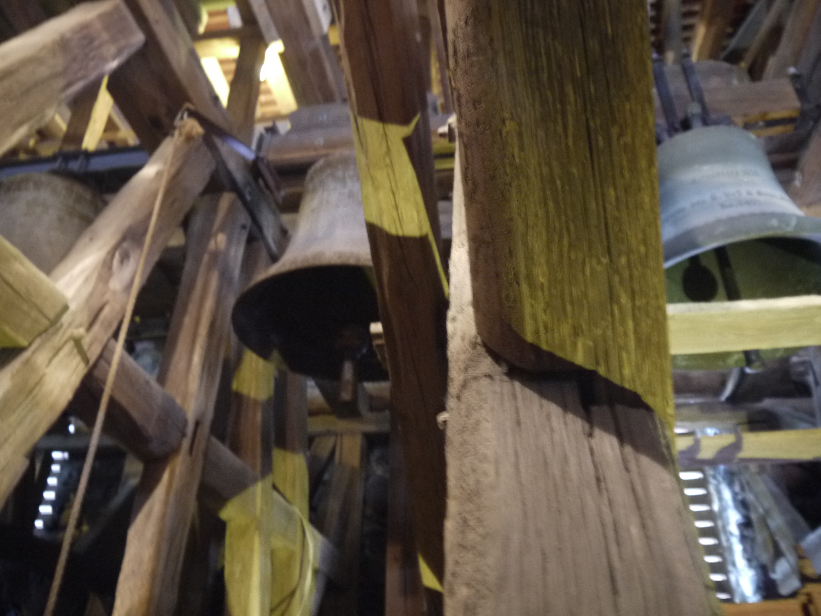 3 der 5 Glocken im Turm der Marienkirche.